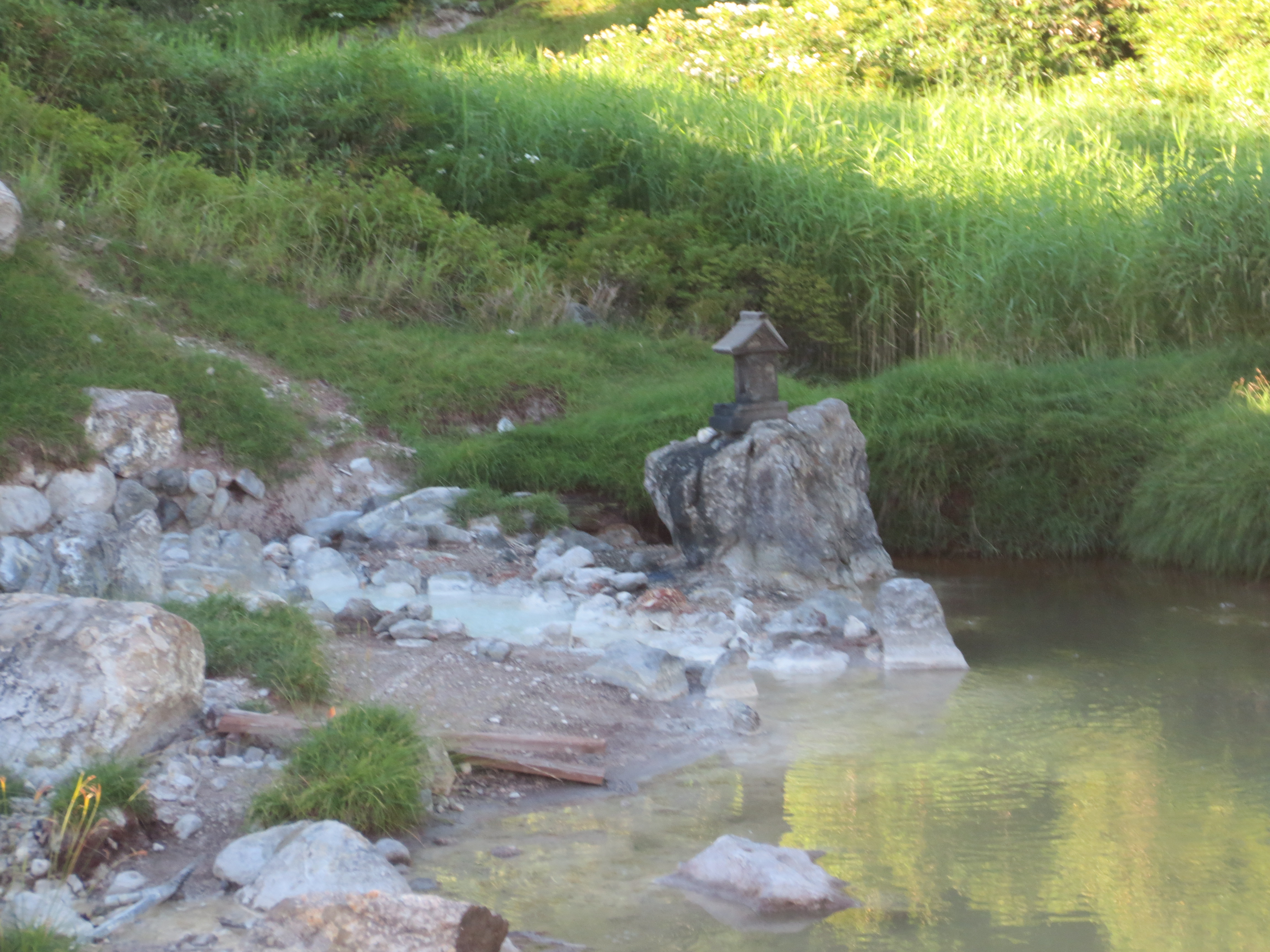 画面中央部の祠の下から湧いている